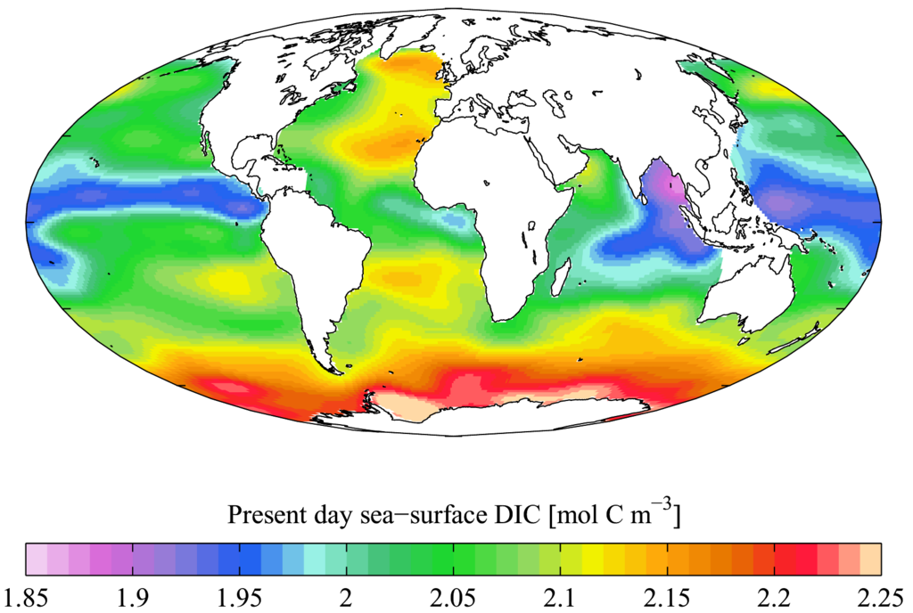 Концентрација на разложен органски јаглерод во хидросферата во деведесетите години н минатиот век.